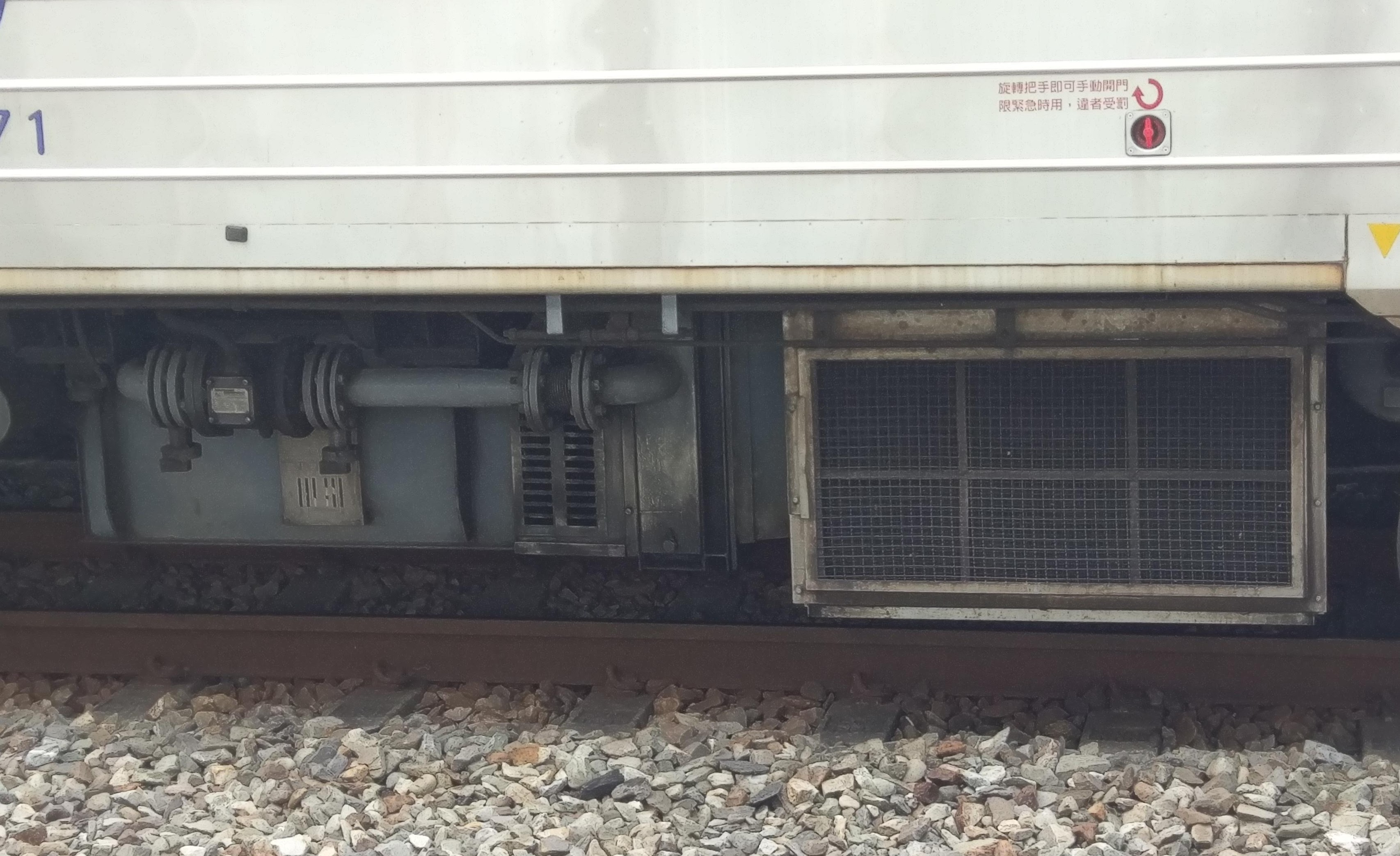 中文（台灣）: 台鐵EMU500型電聯車的主變壓器